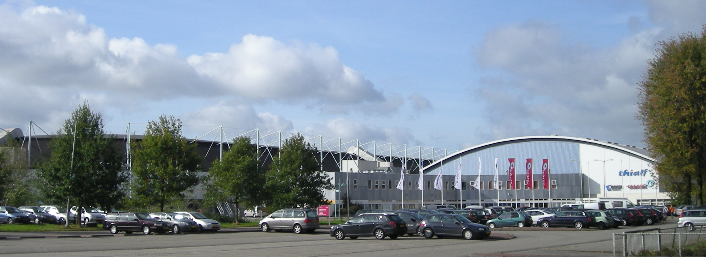 Thialf ijsstadion Heerenveen